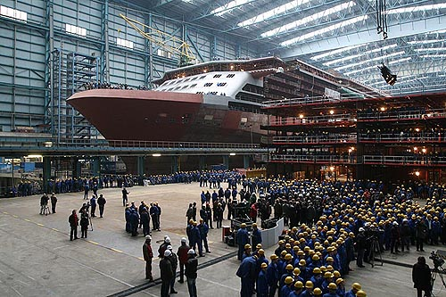 Dock II der Papenburger Meyer Werft bei der Grundsteinlegung. Im Hintergrund die Celebrity Solstice, die im Herbst 2008 ausgeliefert werden soll.